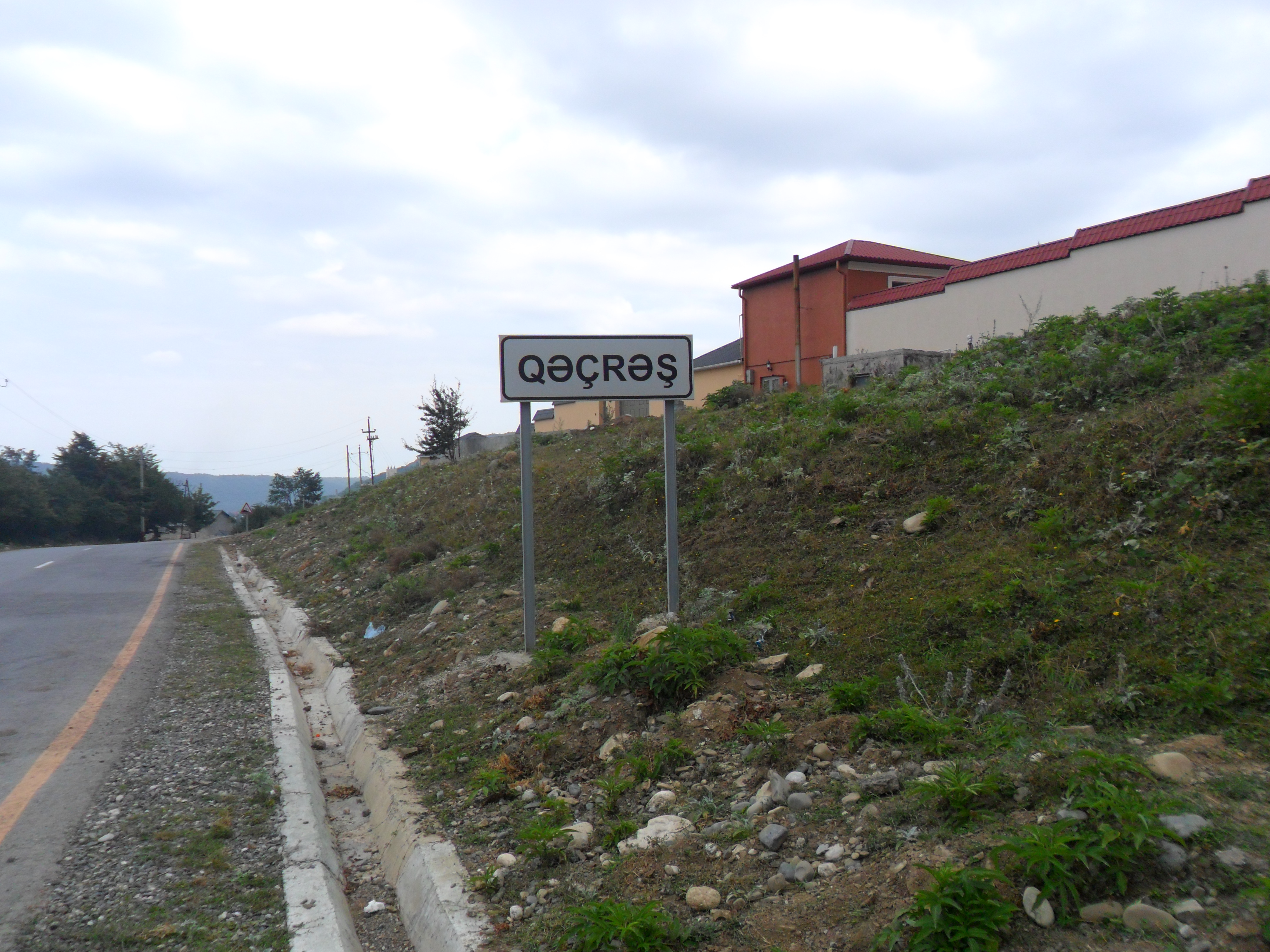 Qəçrəş yol lövhəsi